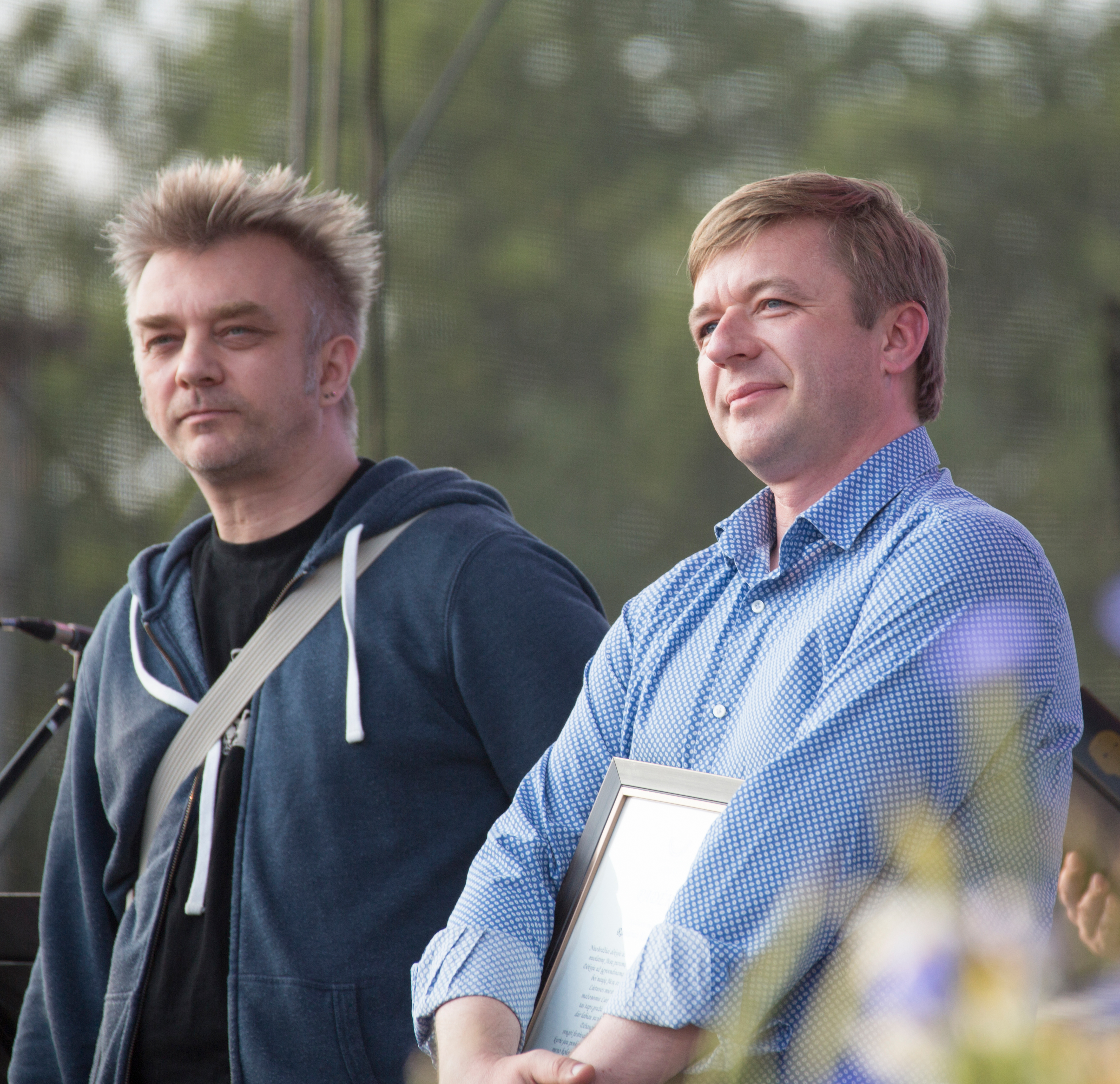 Fondo „Švieskime vaikus“ steigėjai Andrius Mamontovas ir Ramūnas Karbauskis